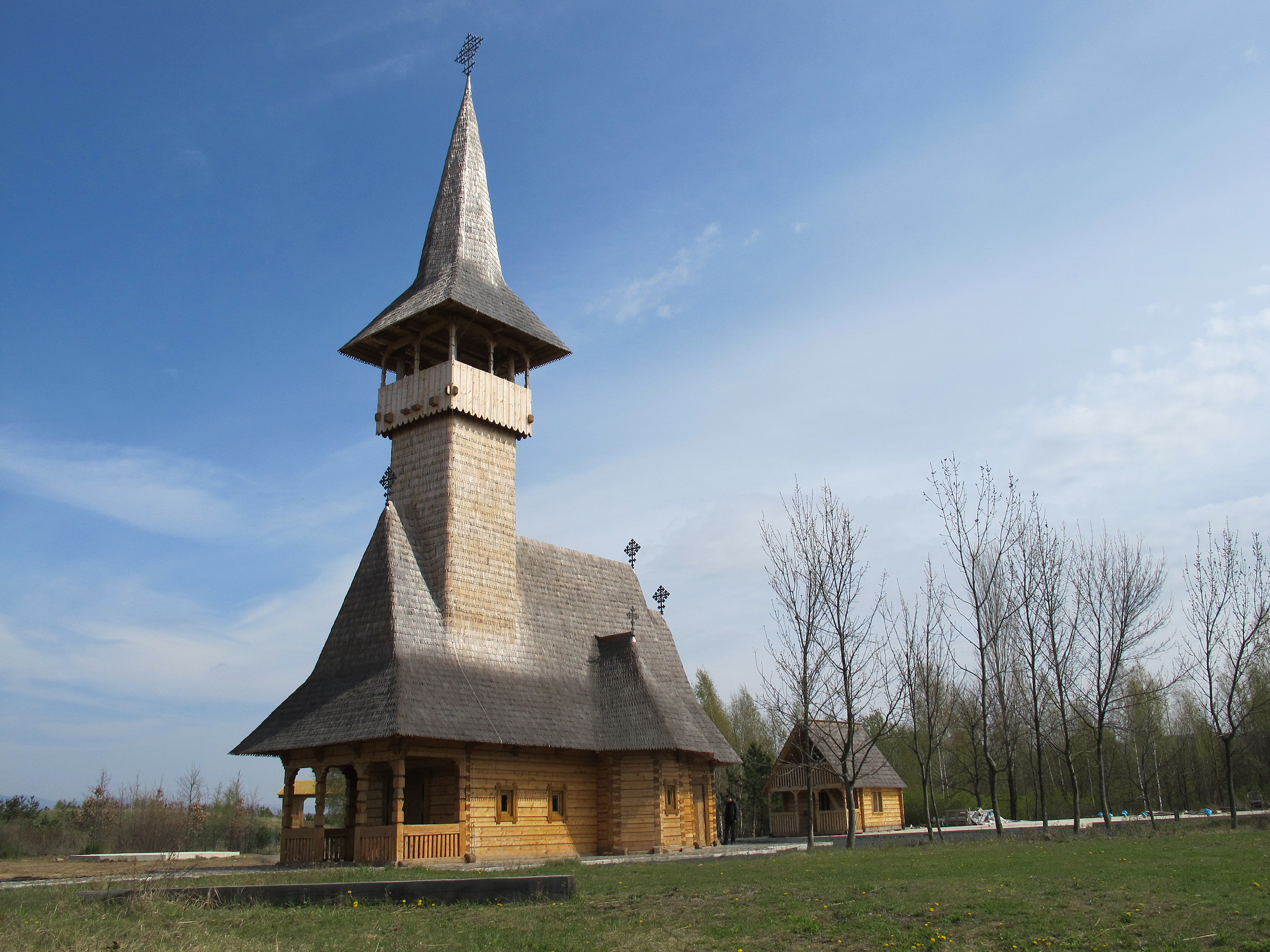 Pravoslavný kostel sv. Valentina v Mostě.